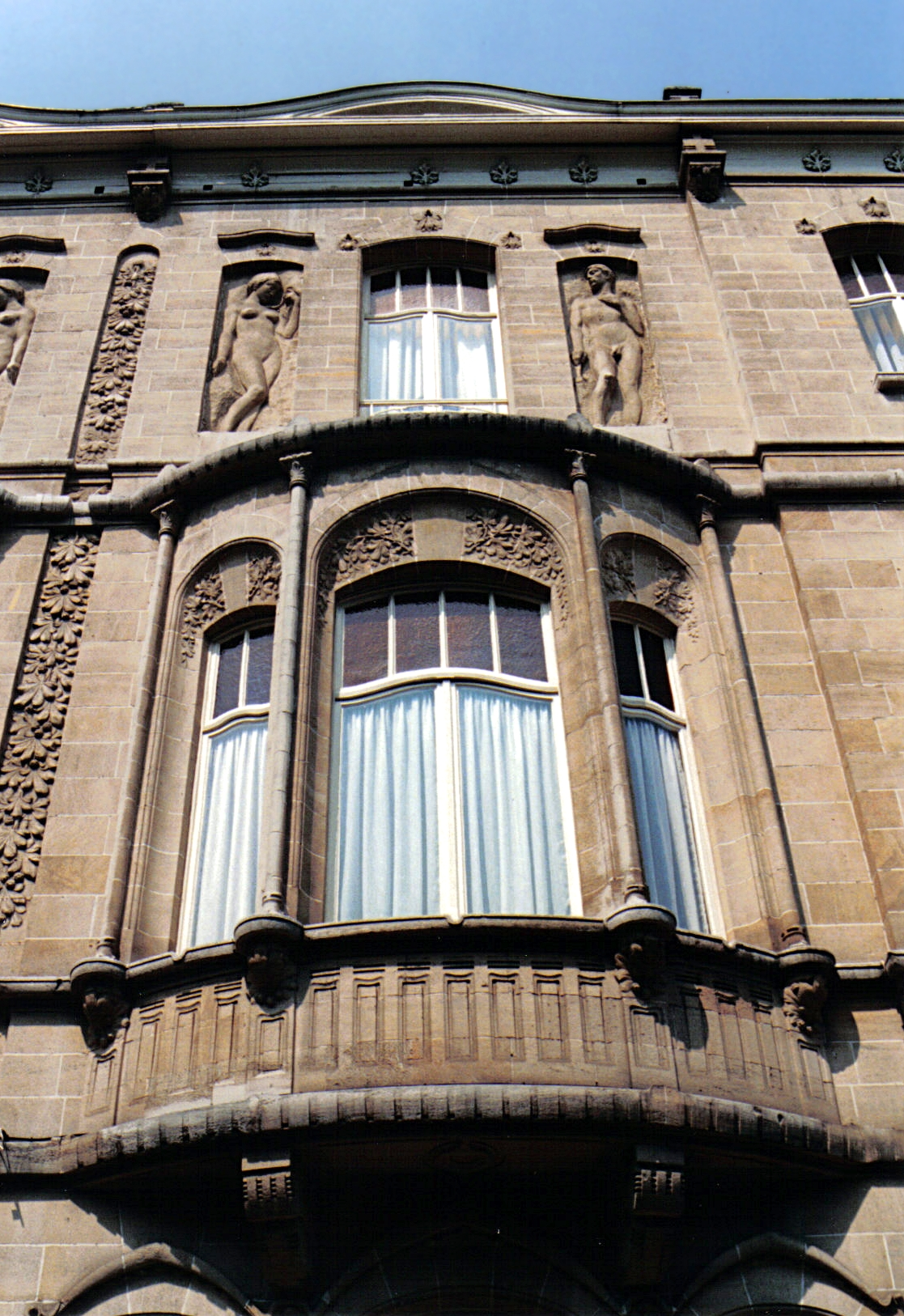 Alphonse Groothaert - Boulevard De Smet de Nayer n° 583-585 à Bruxelles (Art nouveau)